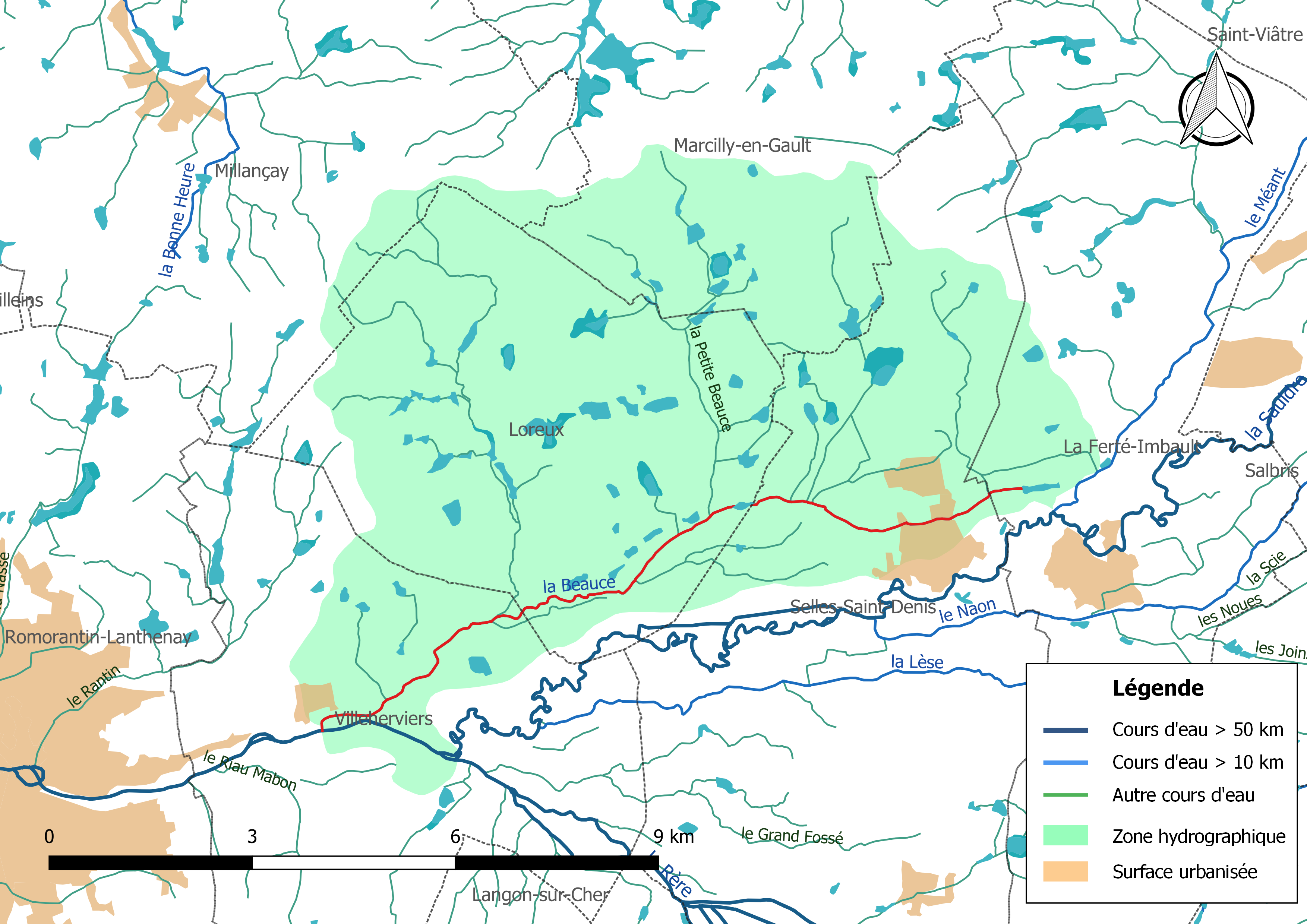 Carte du cours d'eau « la Beauce » et de son bassin versant (zone hydrographique dans laquelle il s'insère).